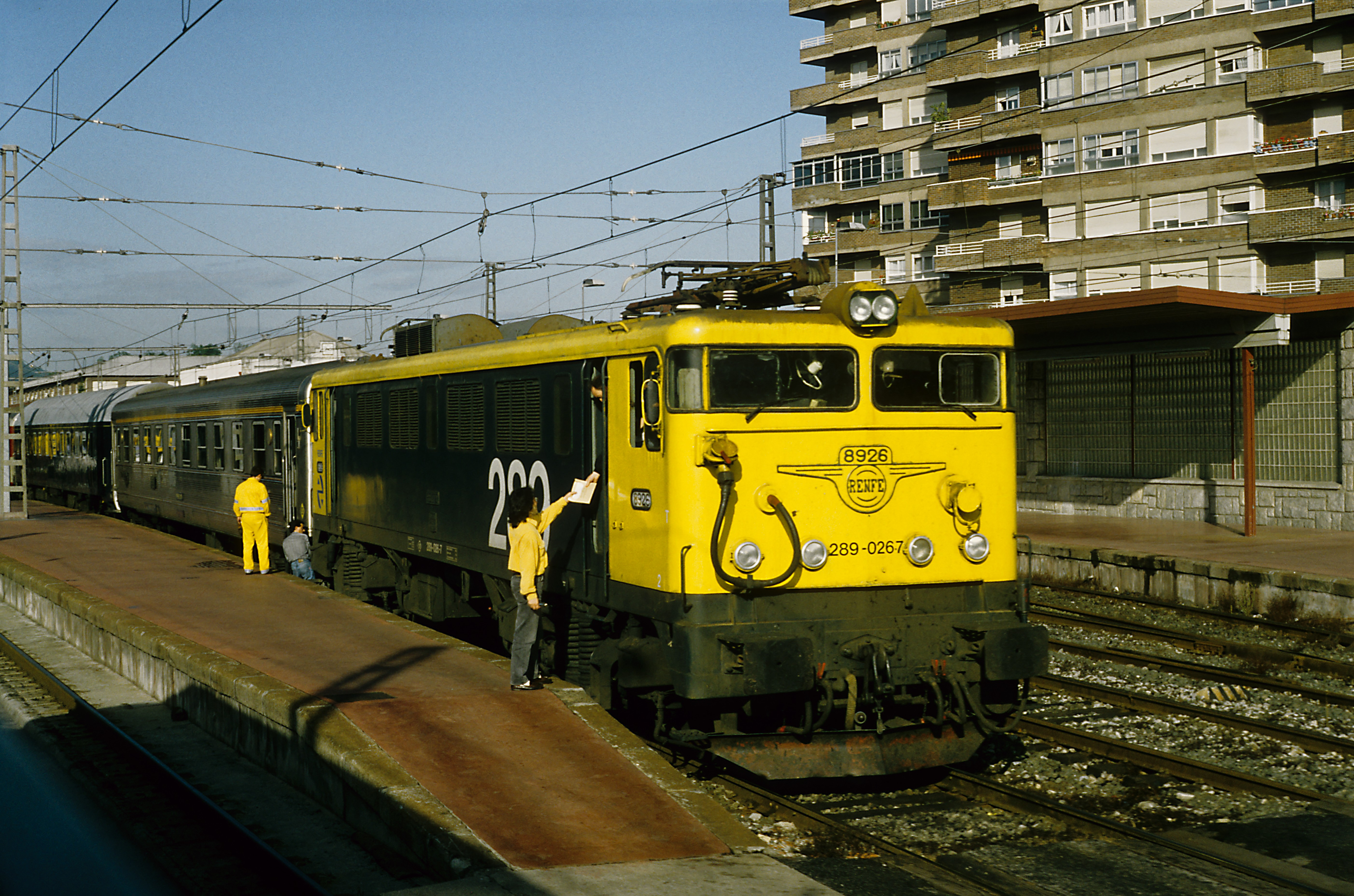 Lisboa S.A.–Paris Austerlitz nach der Ankunft in Irún, noch werden die Liege- und Schlafwagen in Hendaye umgespurt und laufen bis Paris durch.